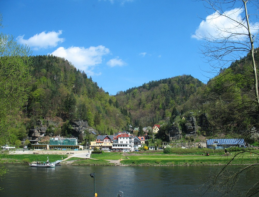 Pohled na saskou pohraniční obec Schmilka z levého břehu Labe